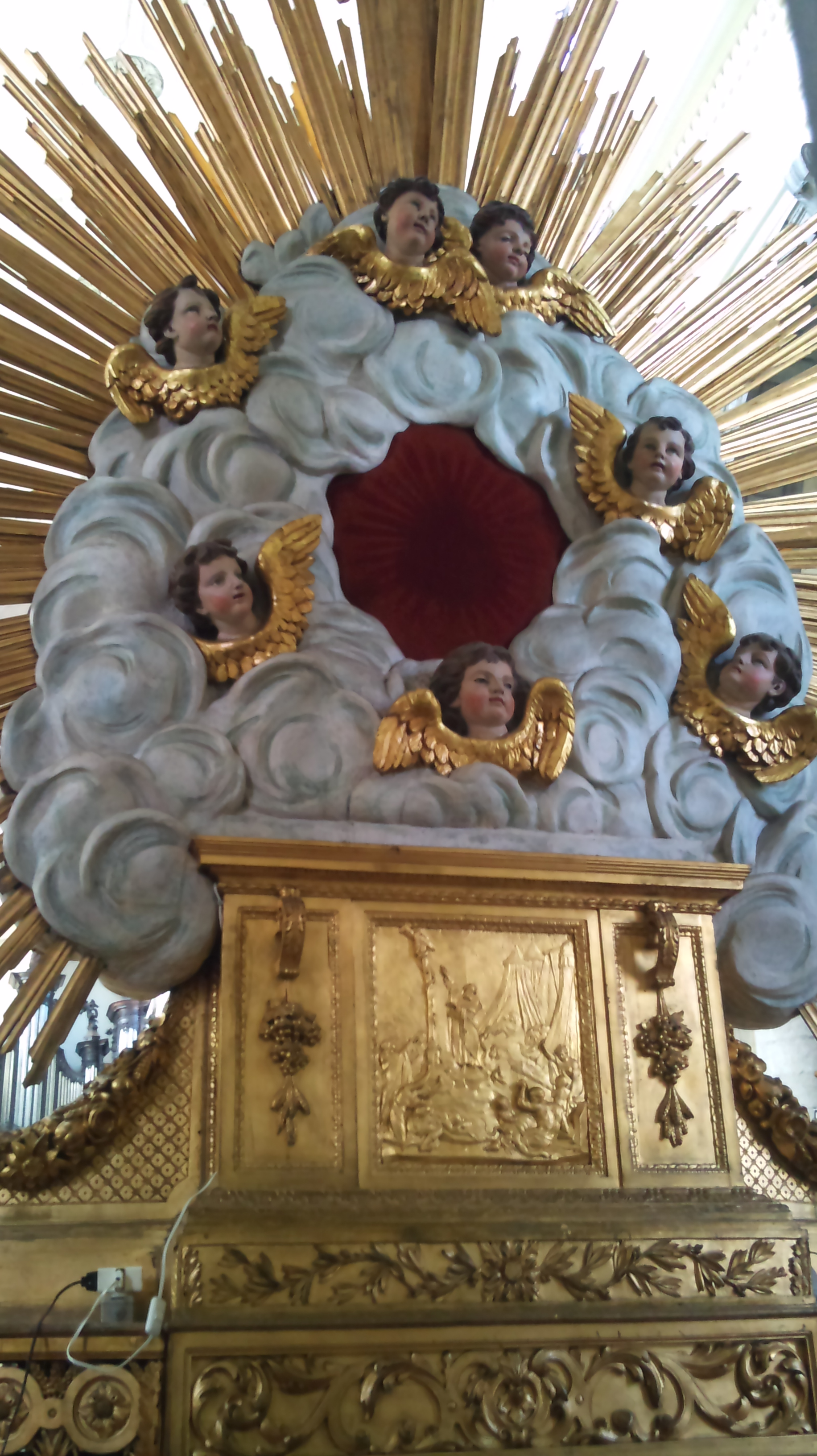 Douai - collégiale Saint-Pierre - Maître-autel coté Chapelle de notre Dame des Miracles